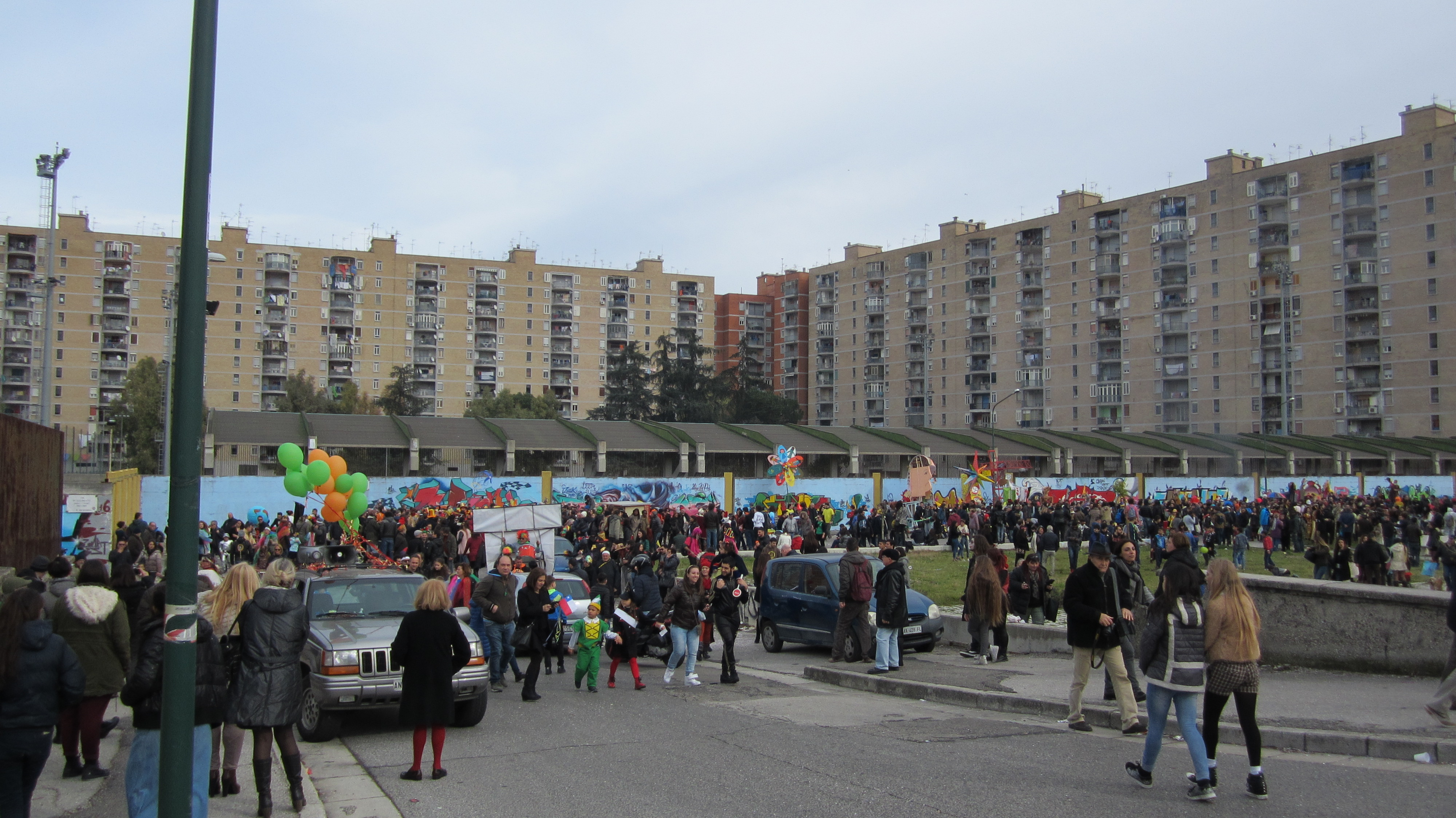 Carnevale di Scampia, veduta di Largo Dino Battaglia